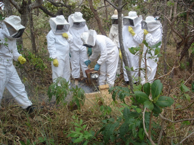 Beekeeping